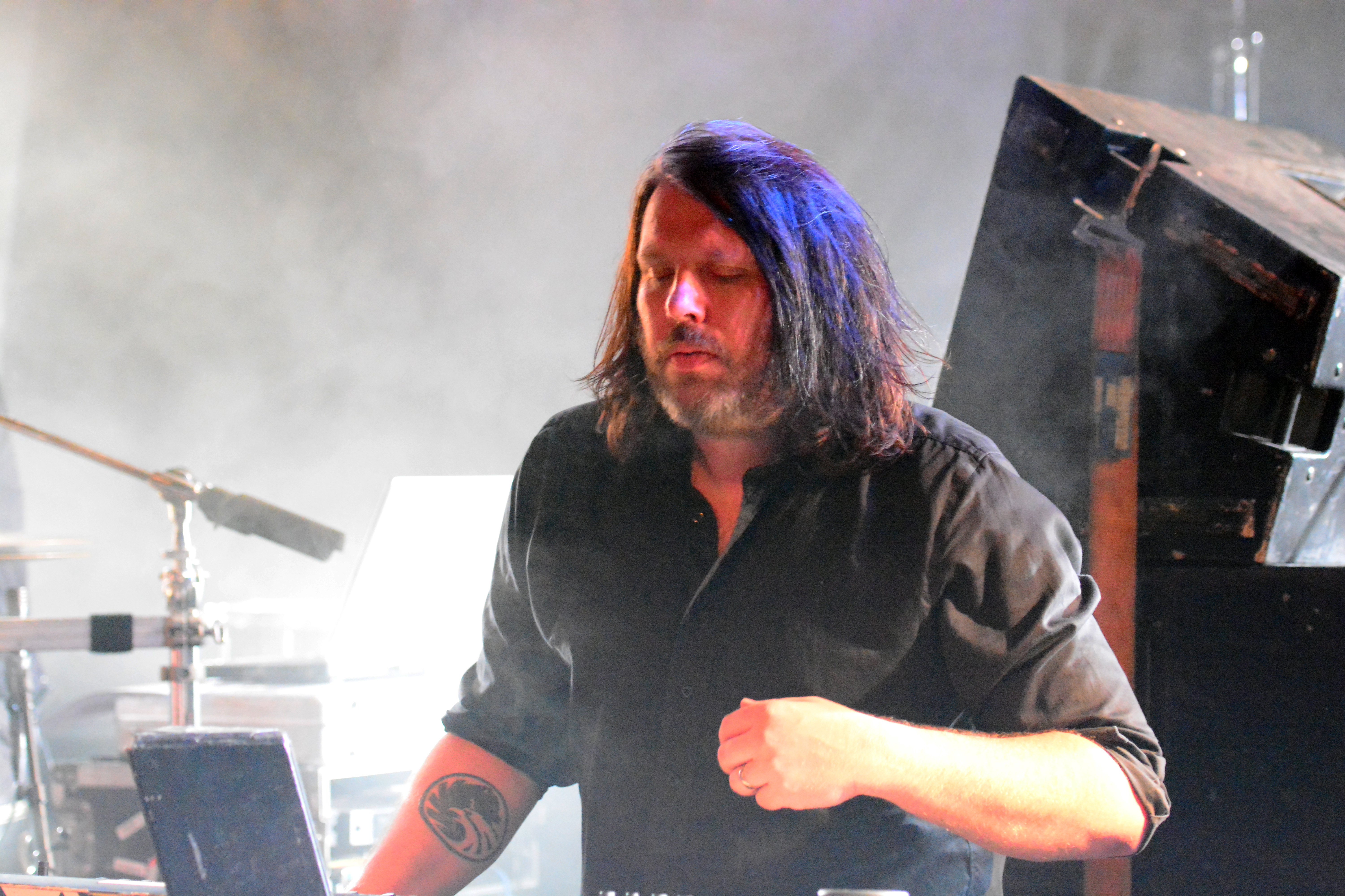 Martin Brändström von Dark Tranquillity bei den Hamburg Metal Dayz 2014